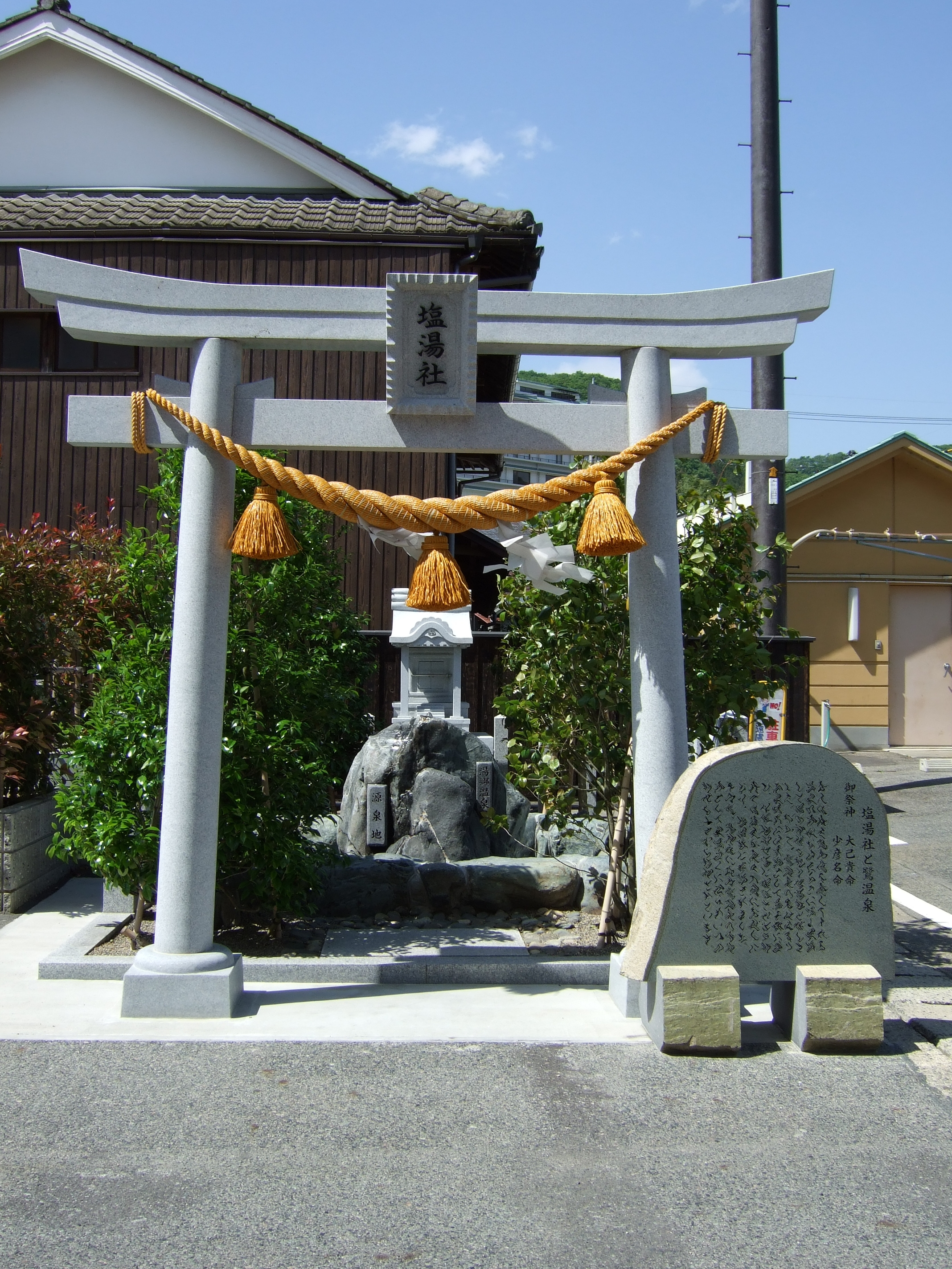 湯郷